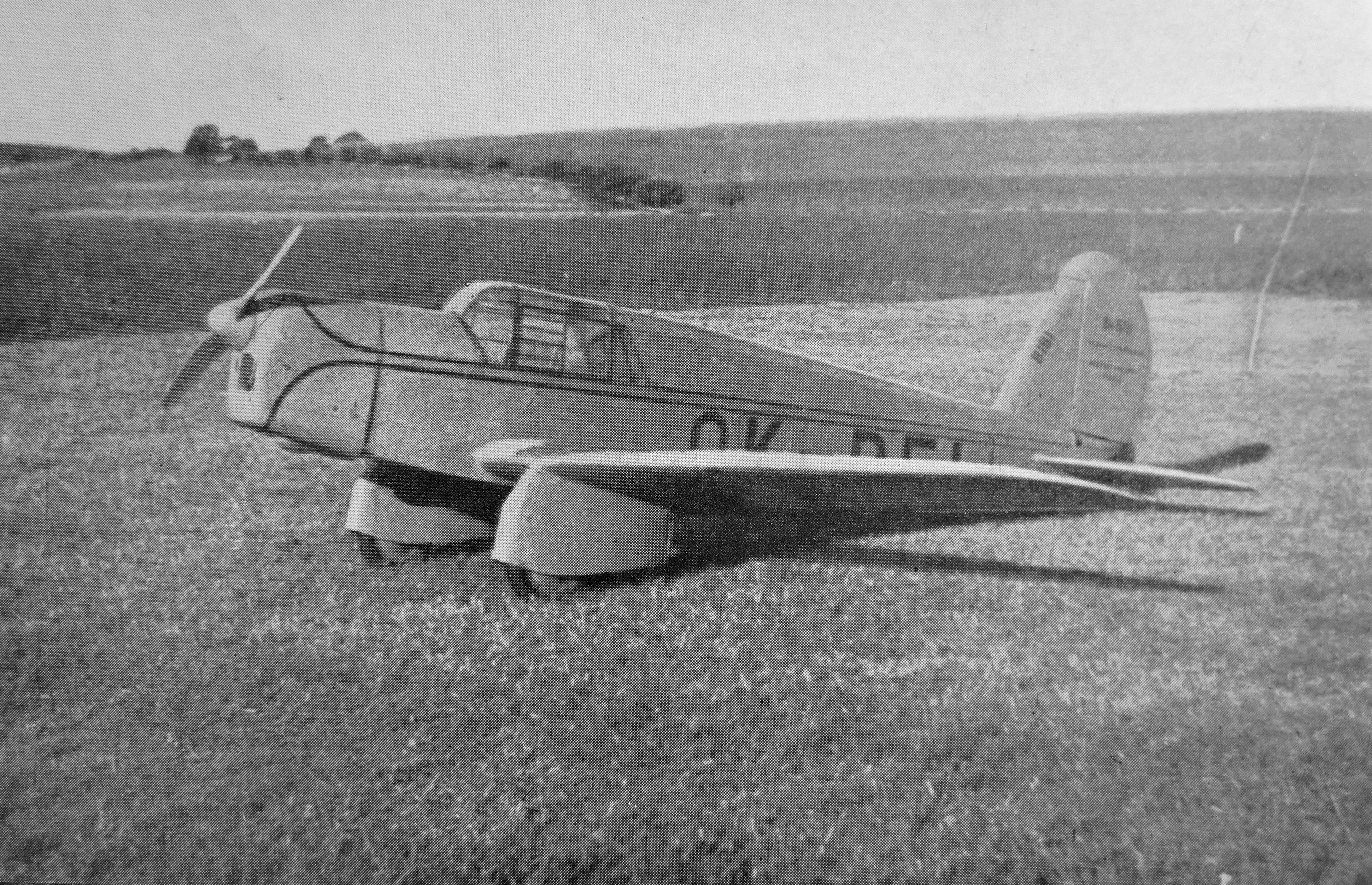 letecký motor Walter Minor 4 a letoun Be-502 Bibi (1936)